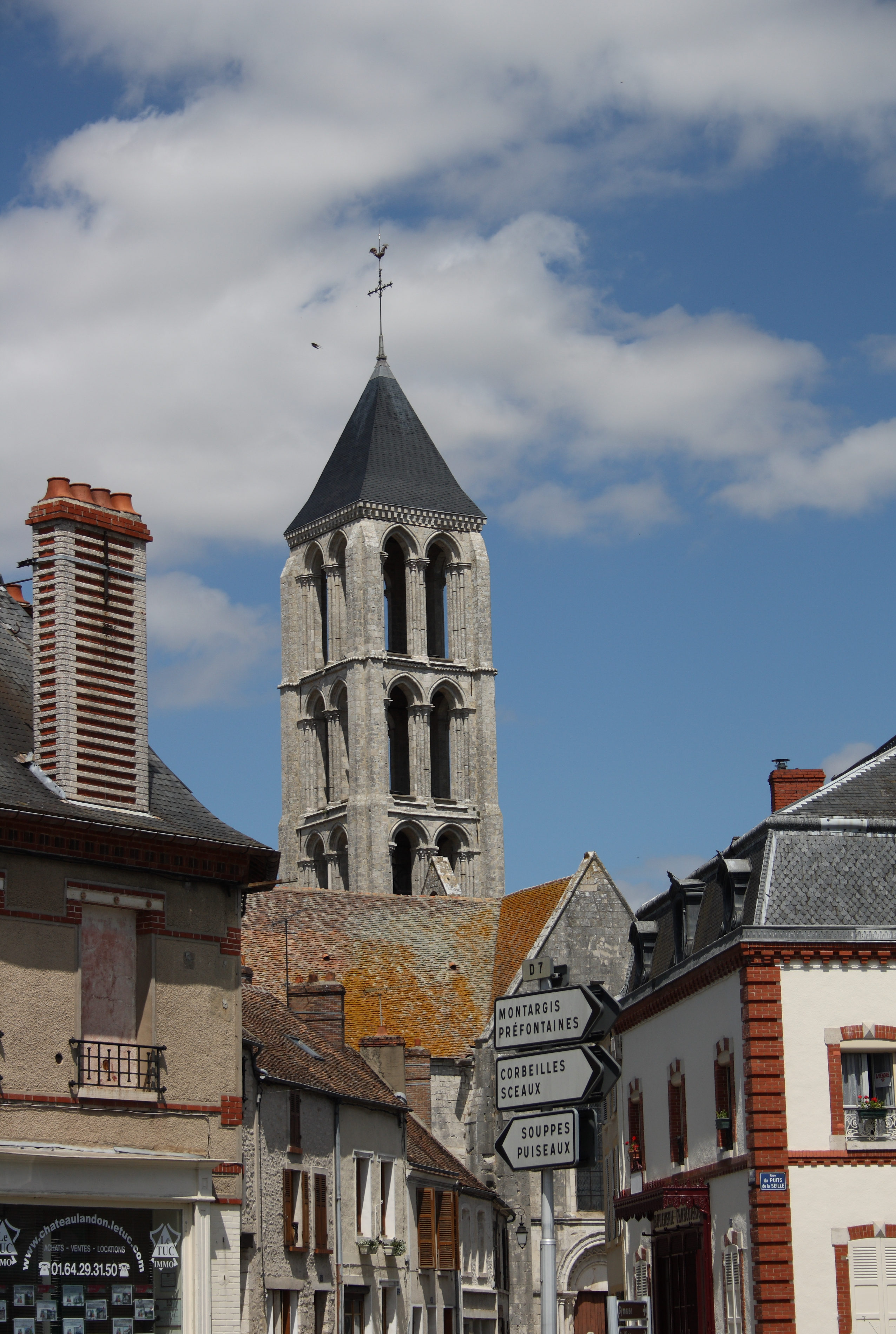 Katholische Kirche Notre-Dame de l'Assomption in Château-Landon, einer Gemeinde im Département Seine-et-Marne (Île-de-France), Glockenturm aus dem 12./13. Jahrhundert